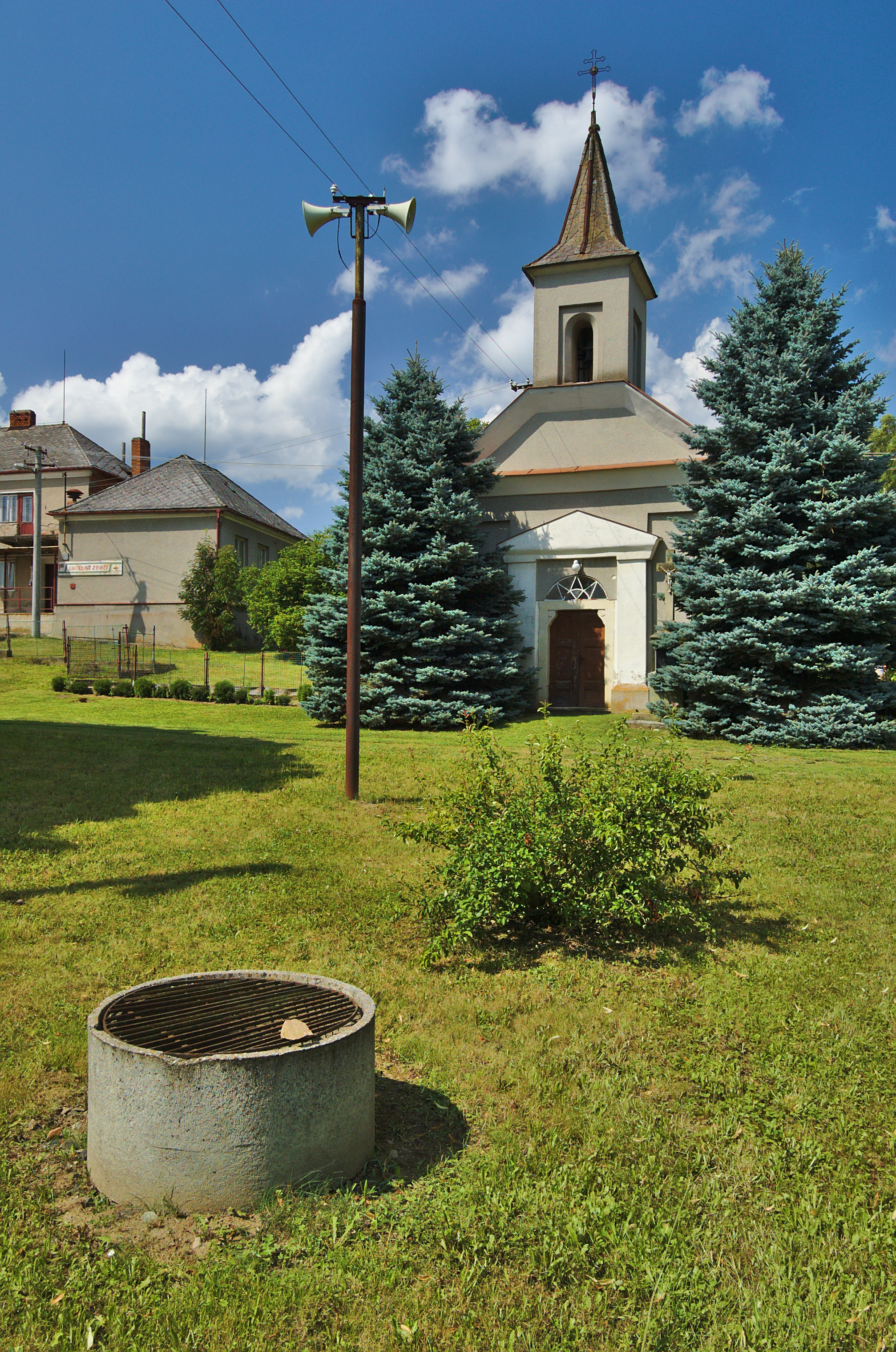 Kaple svatého Jana Nepomuckého, Milkov, Ludmírov, okres Prostějov